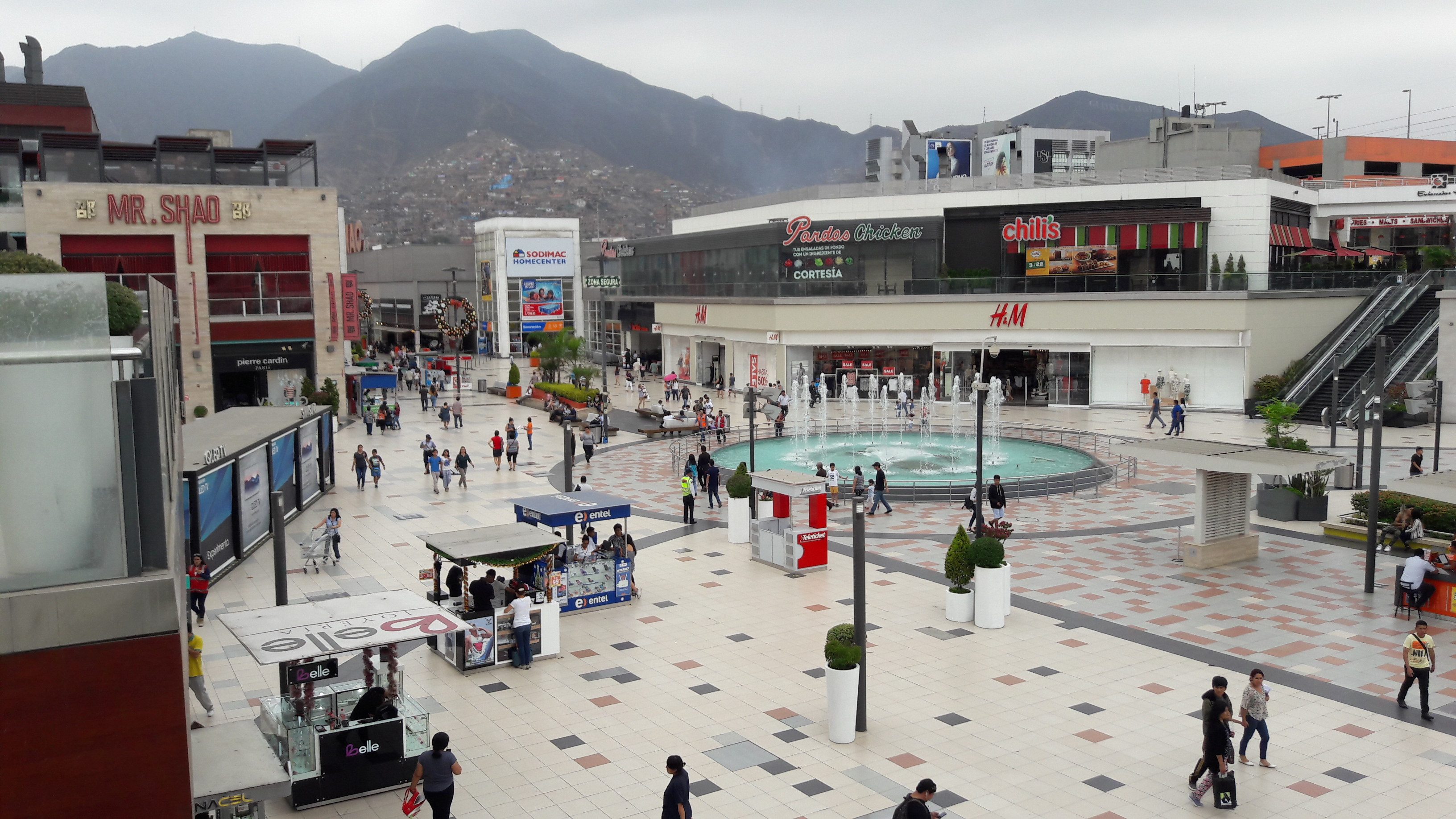 Mega Plaza Lima Norte